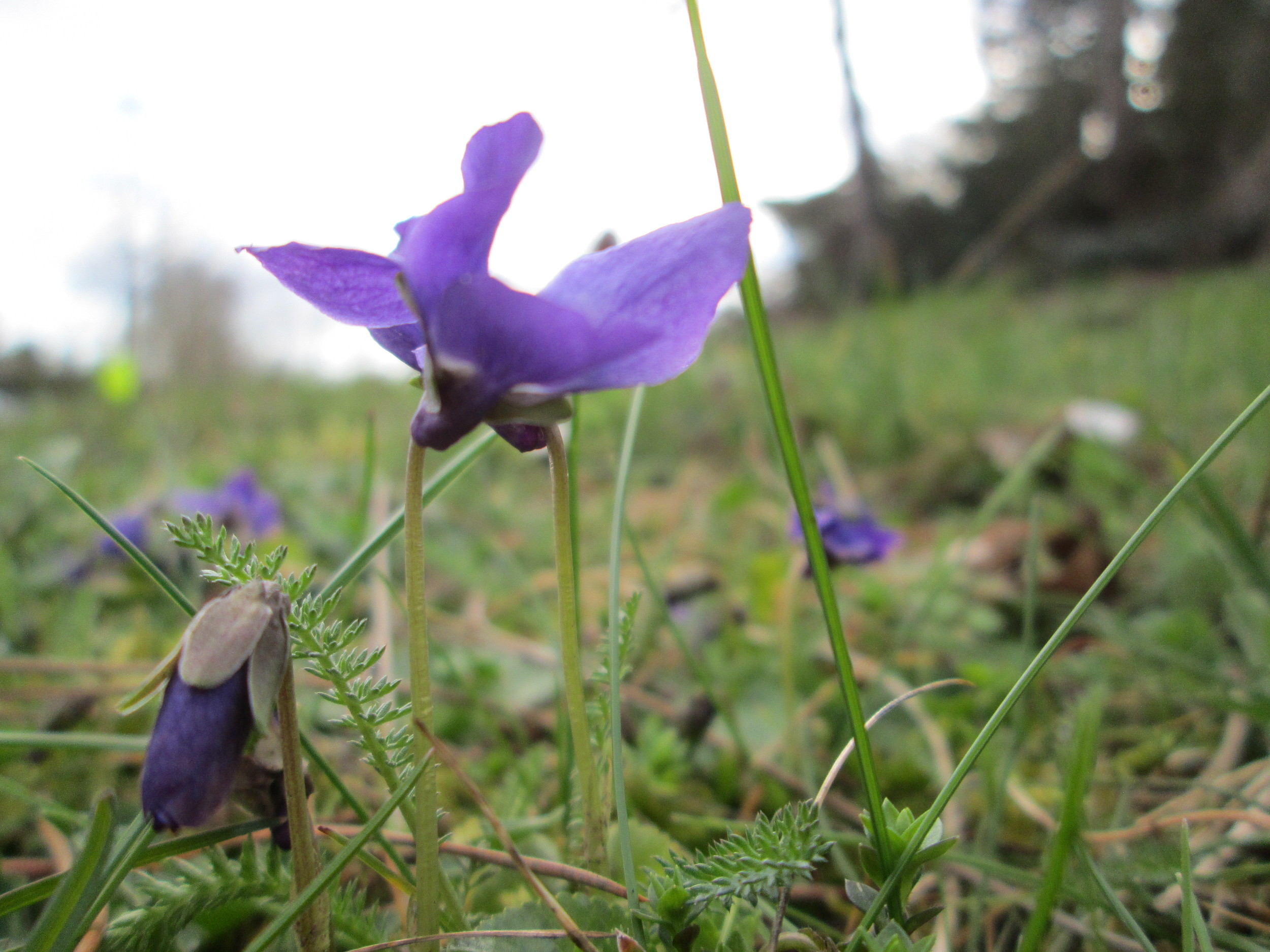 Duftveilchen (Viola odorata) in Hockenheim